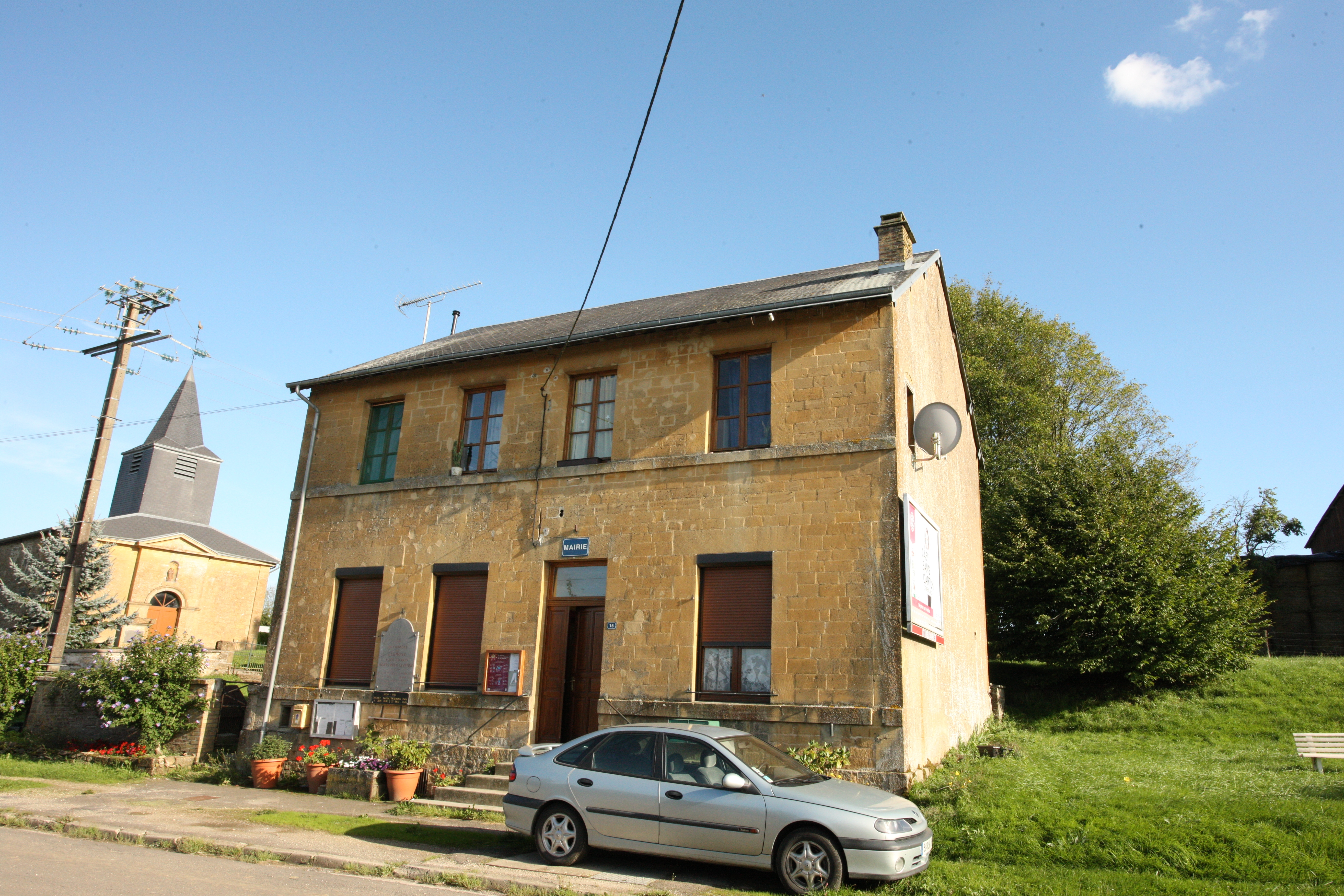 Village Ardennais